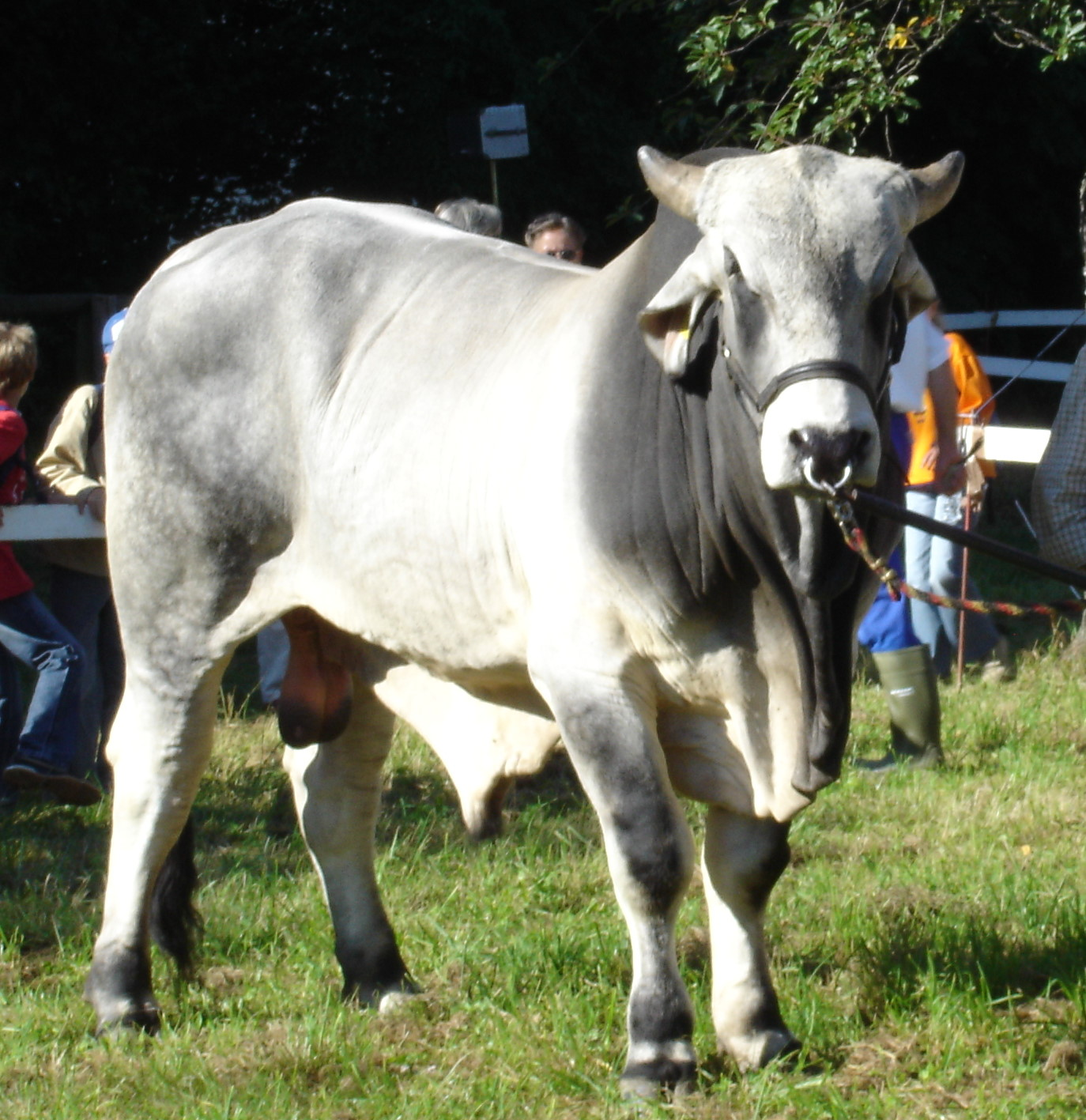 Bulle auf dem Berger (Vieh-)Markt, Ffm-Bergen-Enkheim